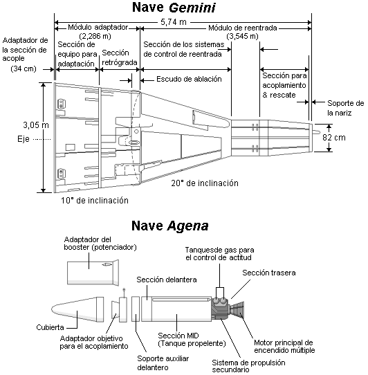 Descripción: Diagrama de la nave Gemini. Autor: Lmb. Estatus de copyright: Libre.